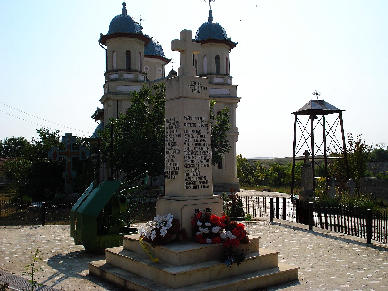 Obelisc în memoria eroilor din primul război mondial